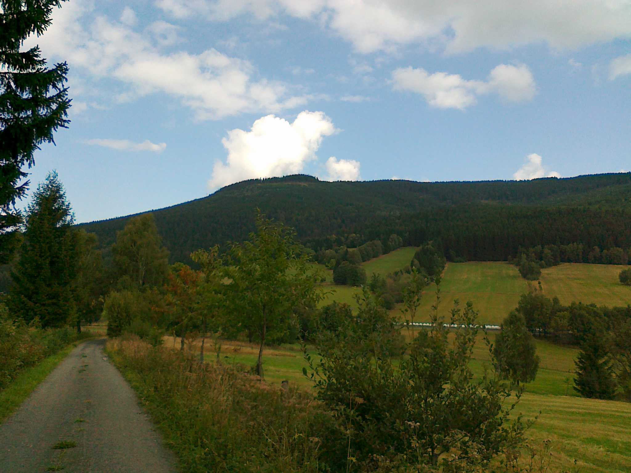 Widok na szczyt Černá stráň-SZ - 1166 m n.p.m. i Černá stráň-ZSZ - 1192 m n.p.m.